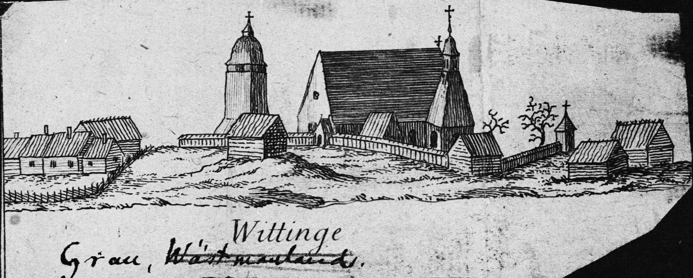 Kyrkan med omgivningar. Foto av teckning, O. Grau: Beskrifn. öfver Västmanland.